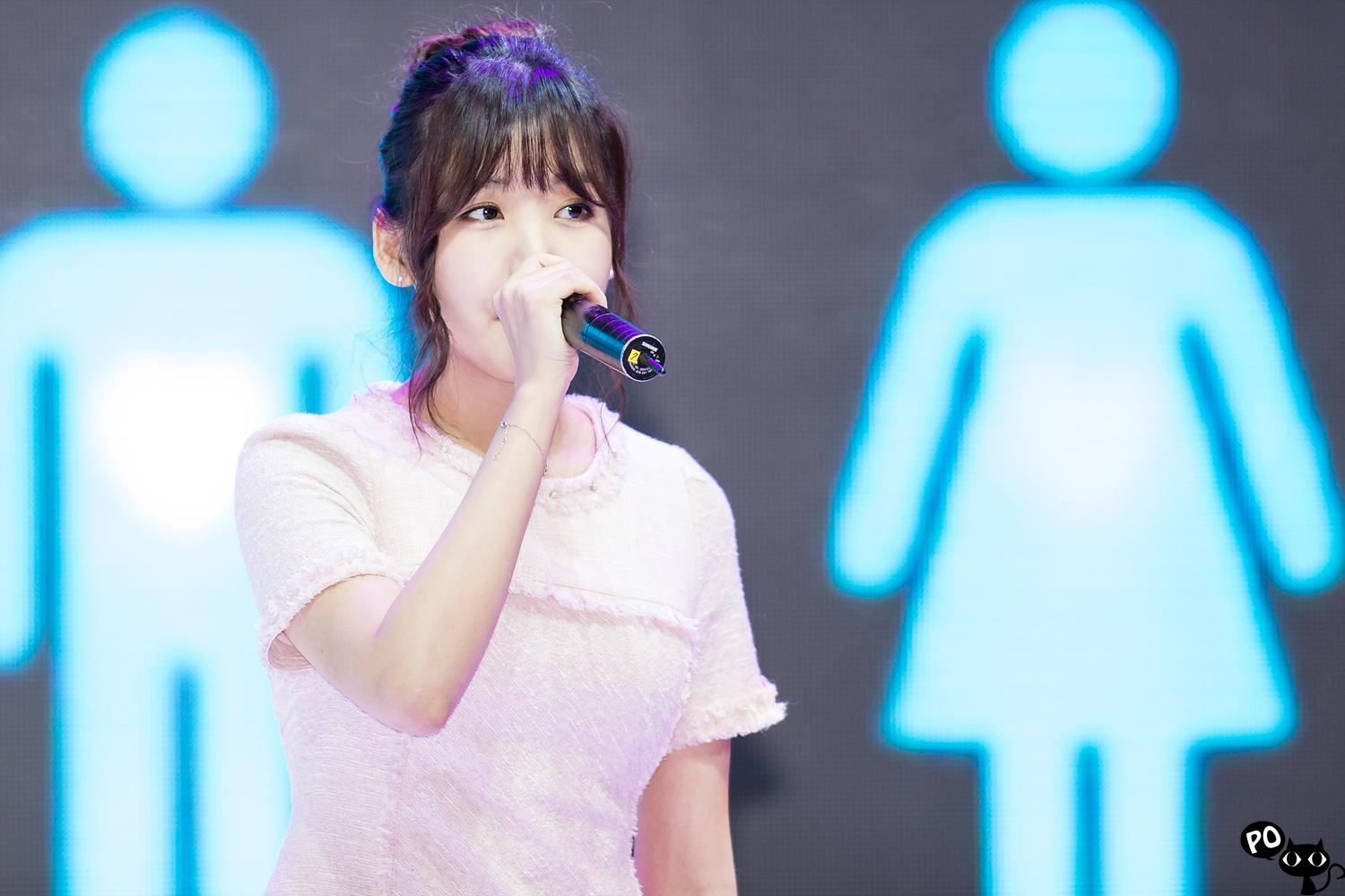 150404.서울모터쇼.레이나